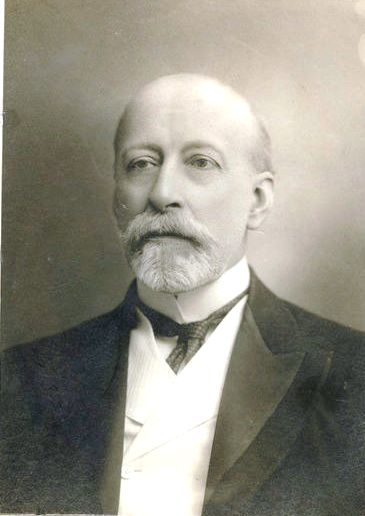 Retrato de José Elías Balmaceda Fernández.